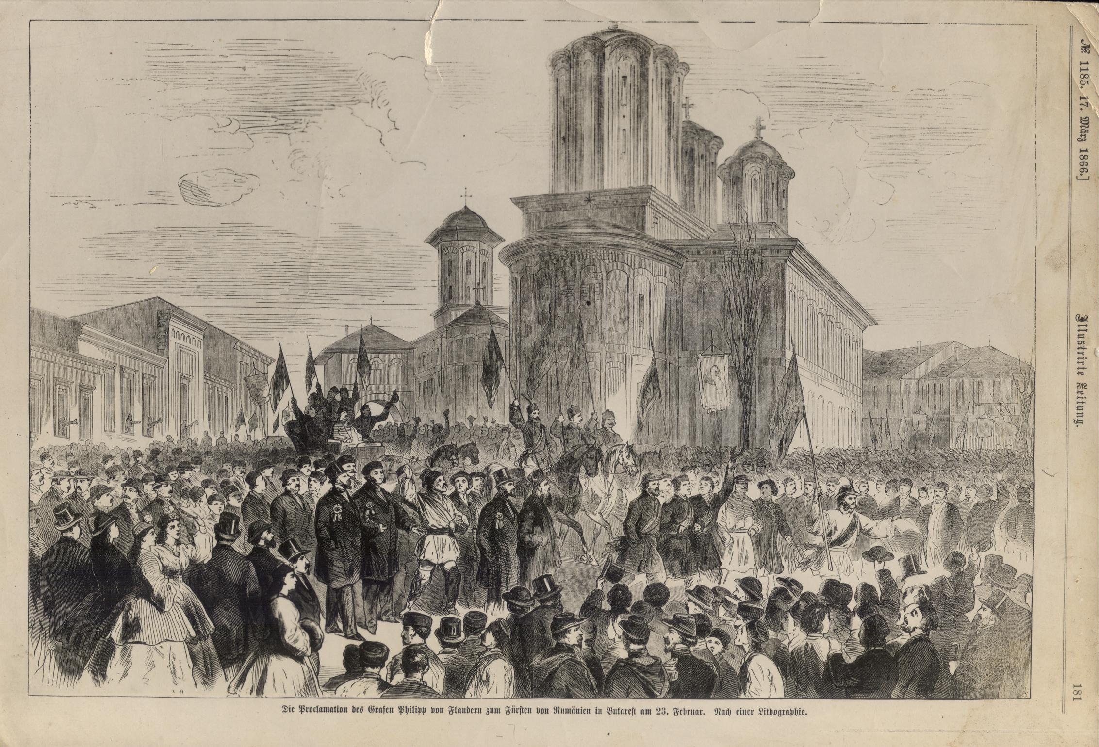 Le peuple des principautés roumaines unies célèbre l'élection du comte de Flandre au trône Roumanie (23 février 1866)